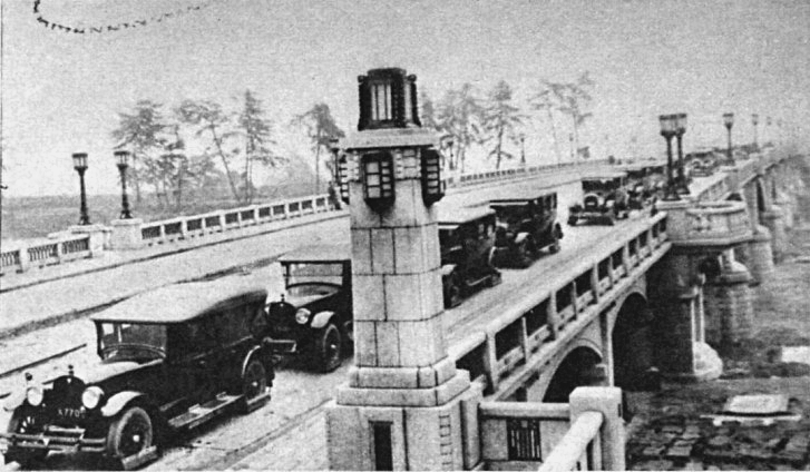 1926年(大正15年)12月25日、阪神国道開通時の武庫大橋の自動車の列。毎日フォトバンク で「阪神国道」と検索すると閲覧出来る。この日、大正天皇が崩御し大正は終わった。